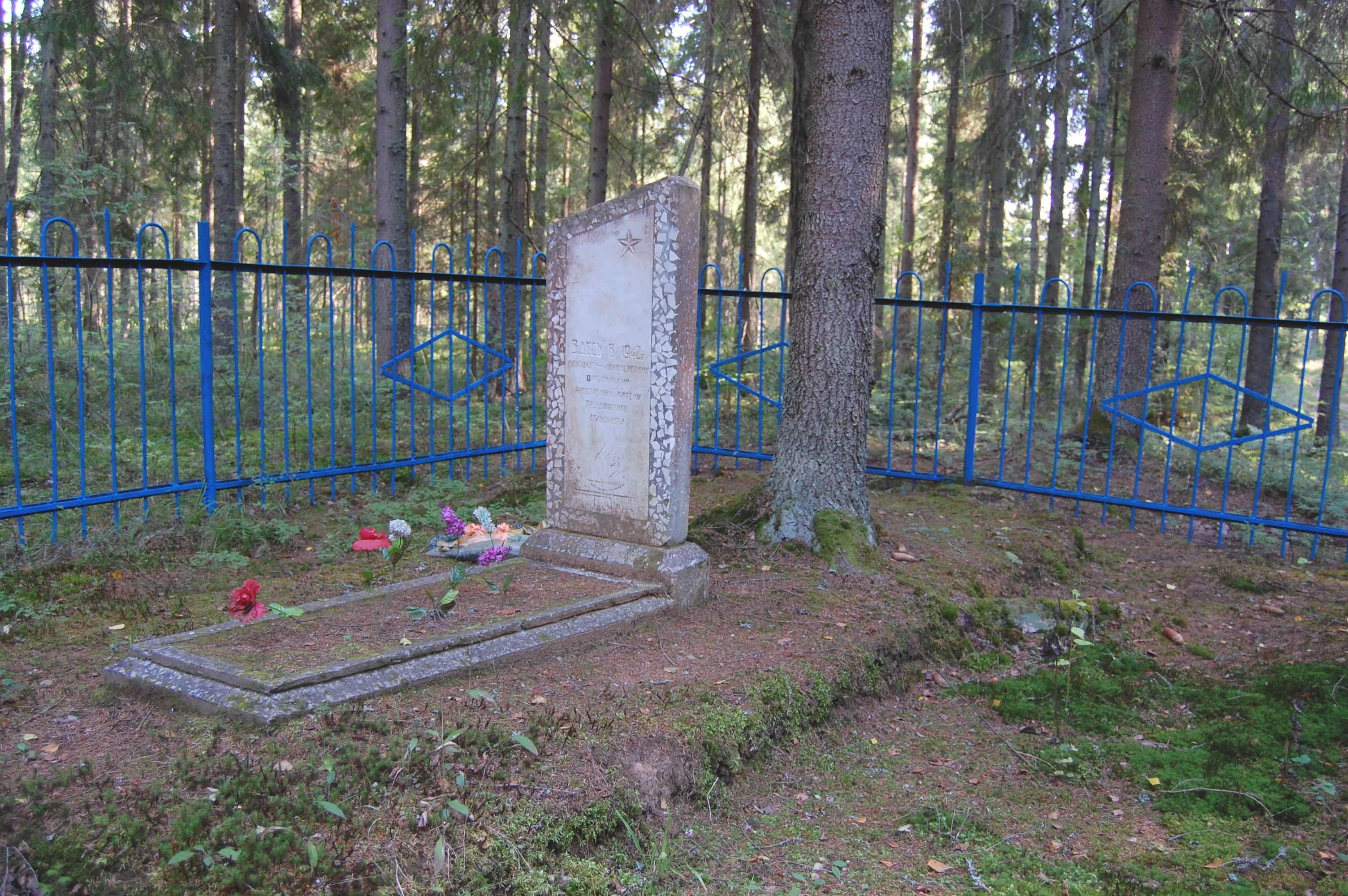 Труды, Полоцкий район. Памятник евреям - узникам местного гетто, убитым в 1942 году.